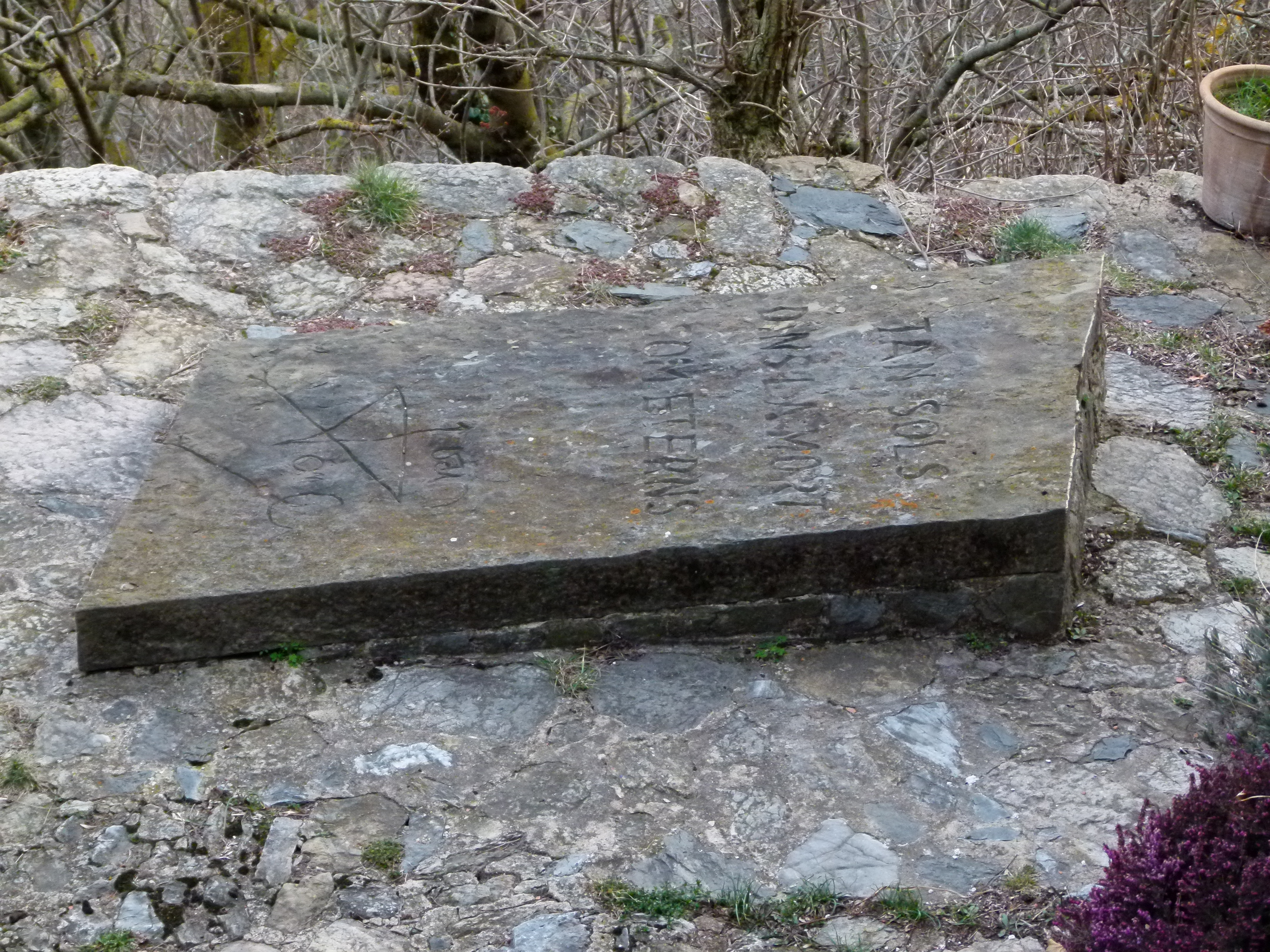 Tomba de Joan Ponç a La Roca. Epitafi: Tan sols dins la mort som eterns.